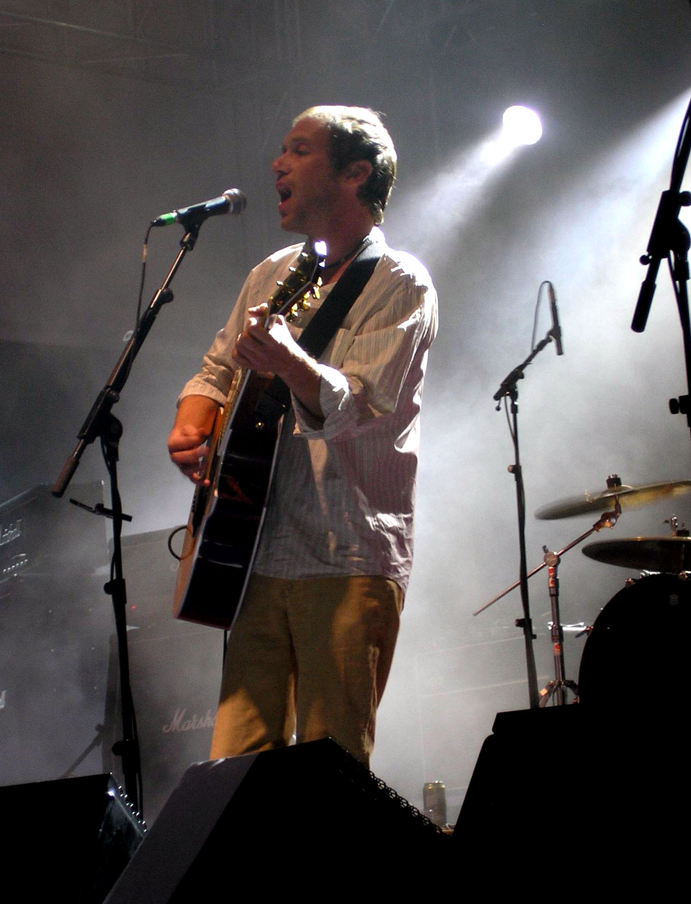 Simon Fowler of Ocean Colour Scene. "Ocean Colour Scene en el Sonorama 2005, Aranda del Duero, Burgos, España. "Única foto decente de toda la noche, mierda de pulso y mierda de garrafón. Pero me la ha publicado un amiguito aquí: whatever that means © Brocco Lee"